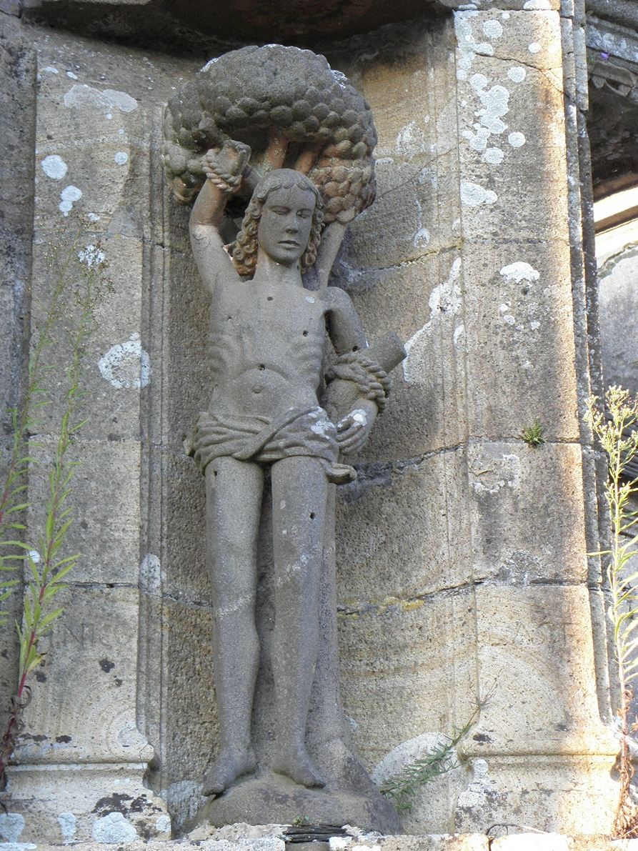 Porche sud de l'église Saint-Pierre de Ploudiry (29). Statue de Saint-Sébastien.